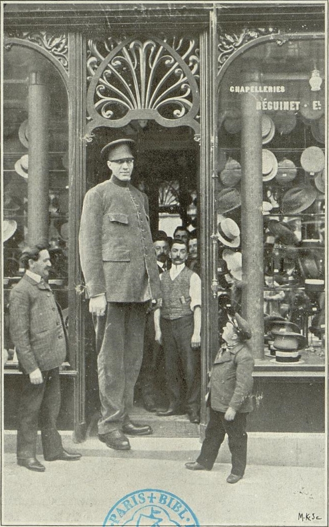 Feodor Machnow coiffé d’une casquette à trois ponts, posant devant la chapellerie Béguinet & Delfoux, 7 rue de la Monnaie, Paris, 1er arrondissement